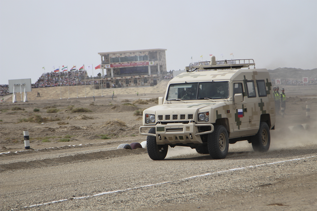 Эстафета международного конкурса «Безопасная среда-2017» на полигоне «Корла» Синьцзян-Уйгурского автономного района КНР.